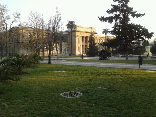 Museo Nacional de Historia Natural This is a photo of a national monument in Chile: 879